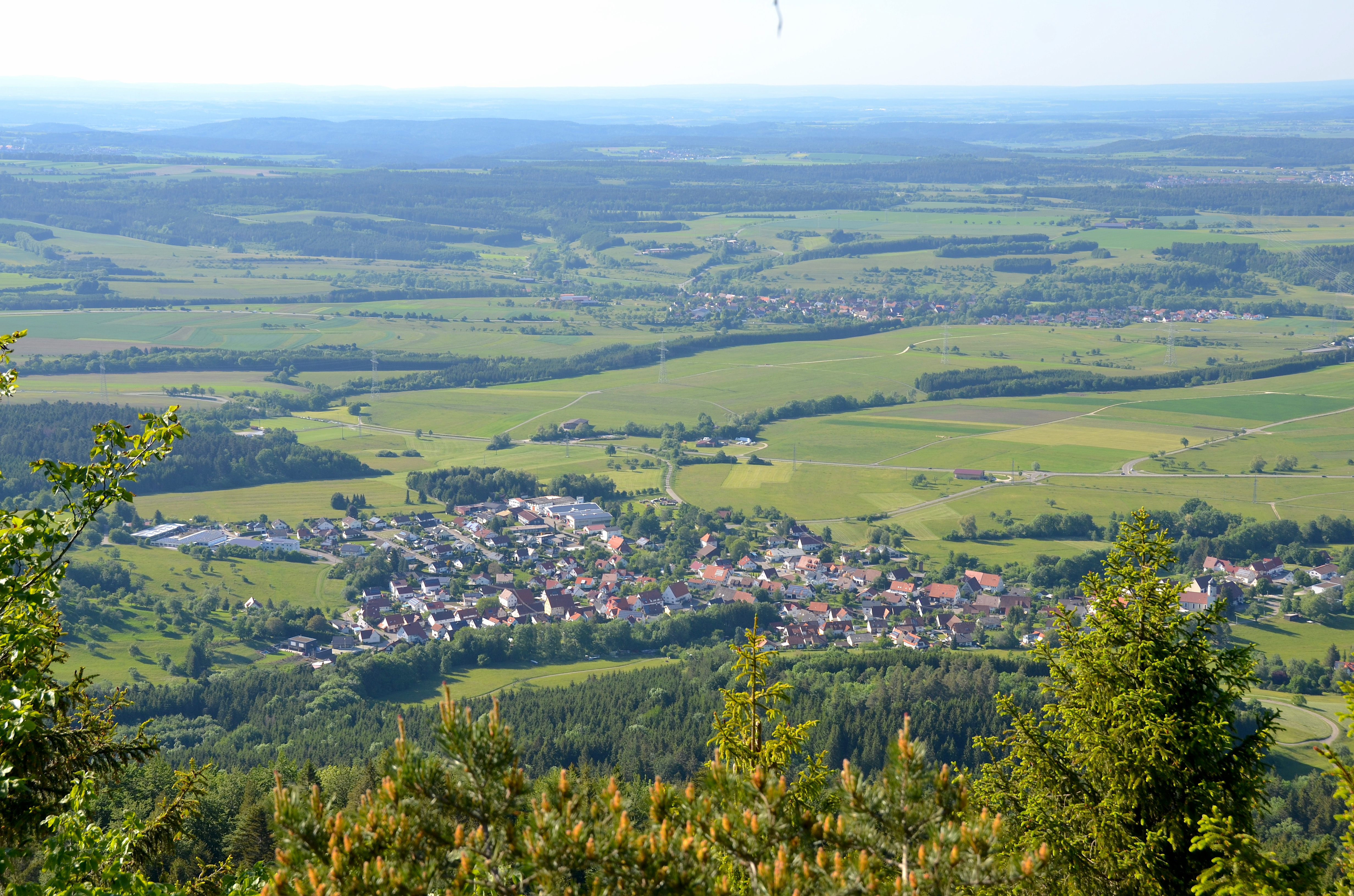 Roßwangen bei Balingen vom Schafberg (Schwäbische Alb) aus gesehen